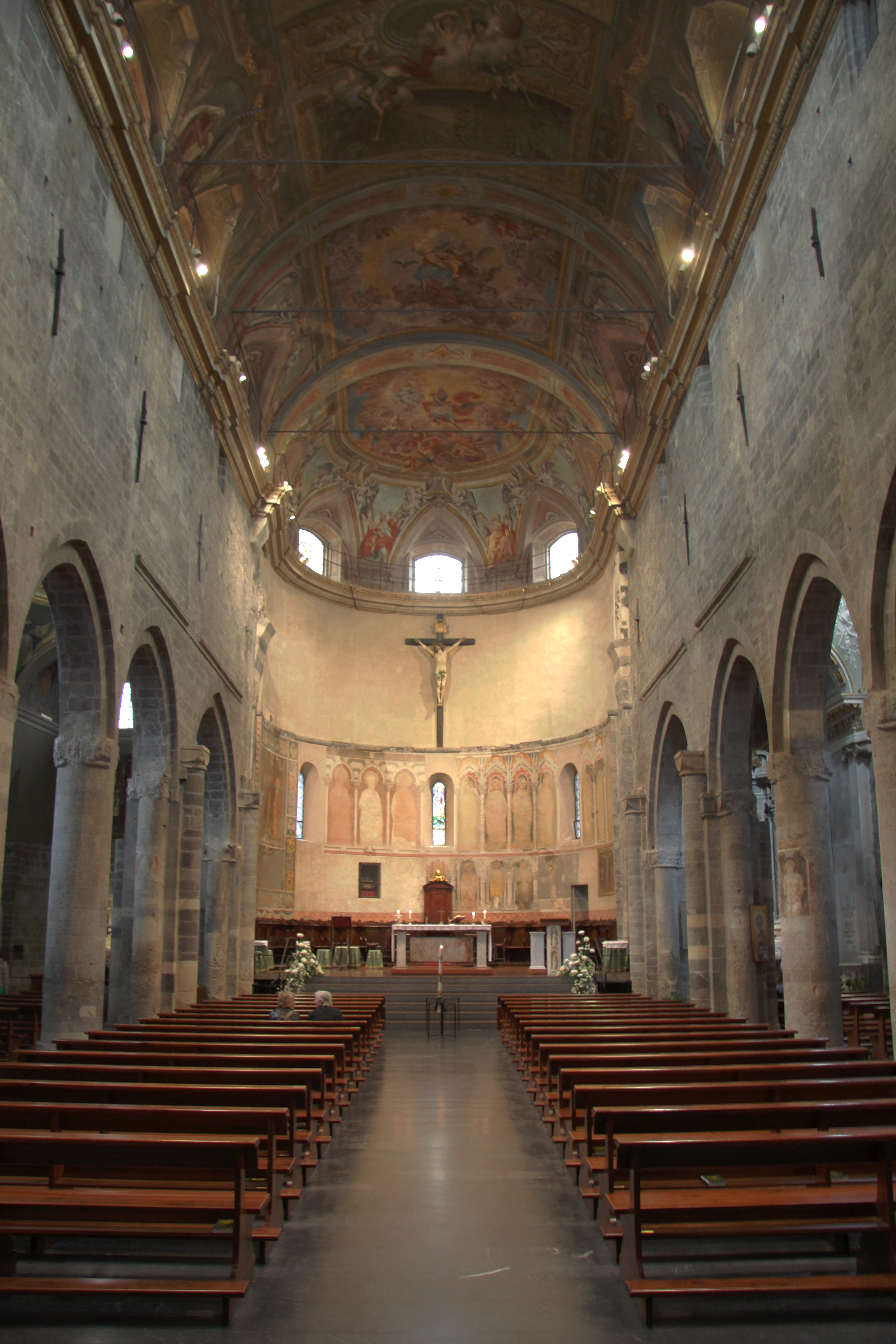 Interno della cattedrale di Albenga, Liguria, Italia